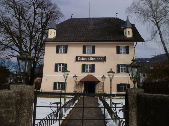 Ansitz, Gasthaus, sog. Doktor-Schlössl